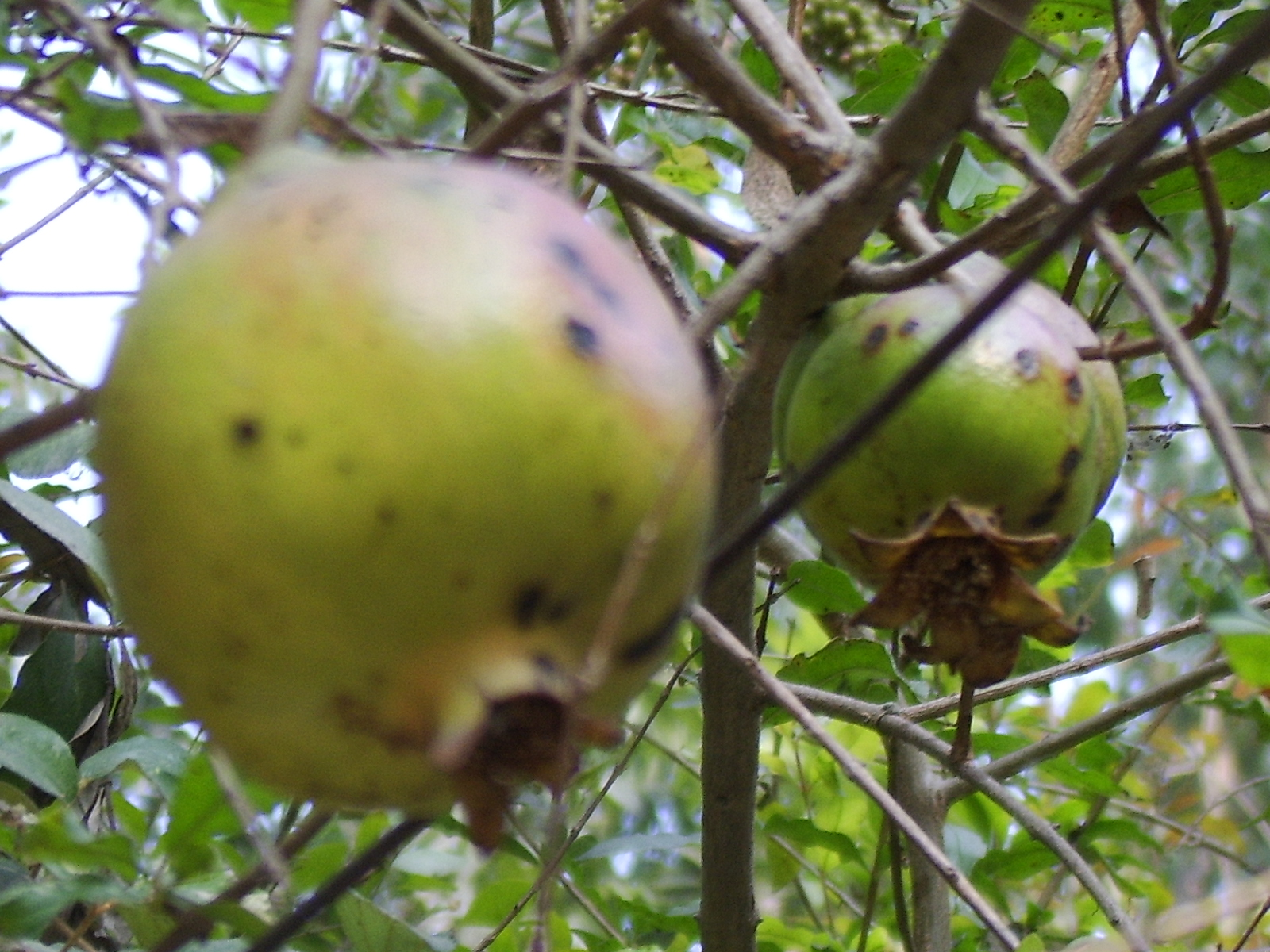 Dalim